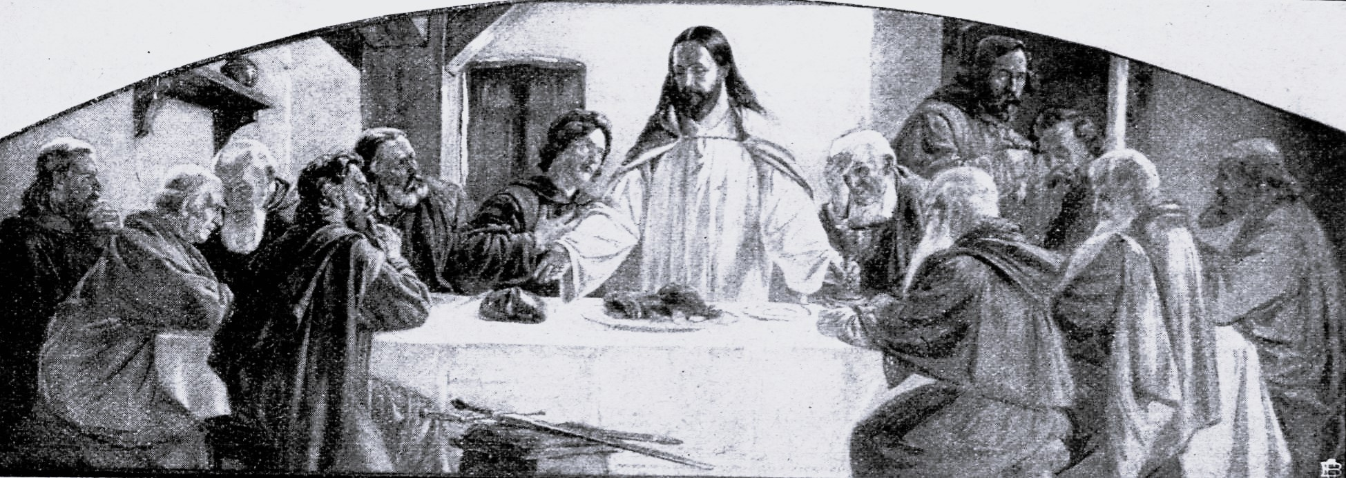 gestiftet von Ferd. Kayser, kängt im Vorstandszimmer des Marienwerkhauses